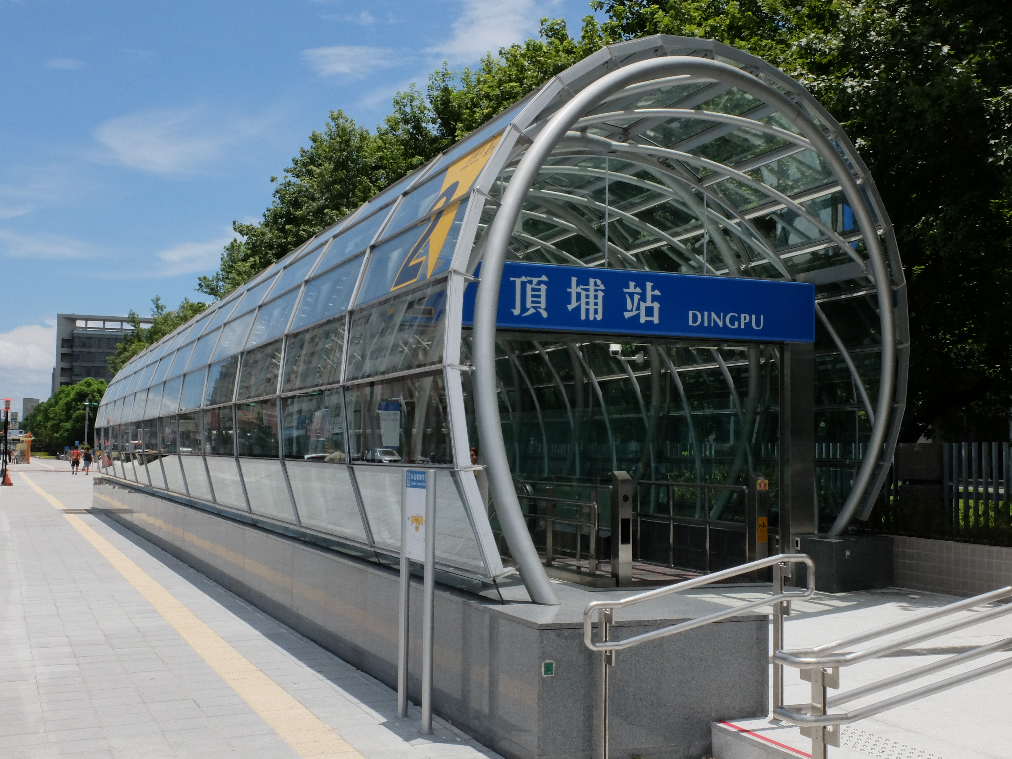 台北捷運頂埔站出口2外觀。